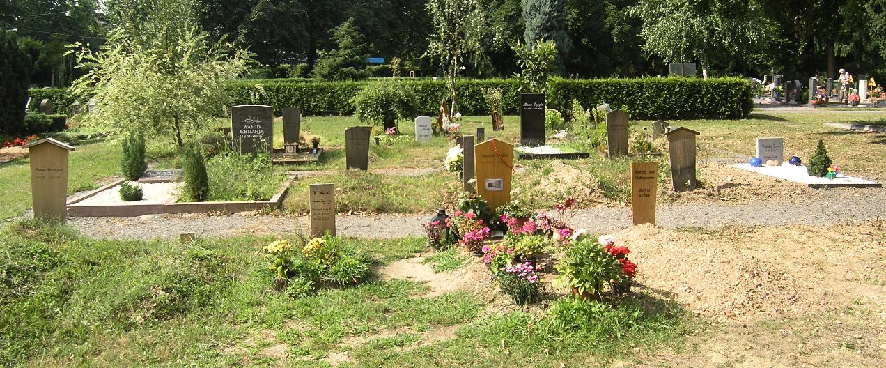 Muslimisches Grabfeld auf dem Hauptfriedhof Karlsruhe